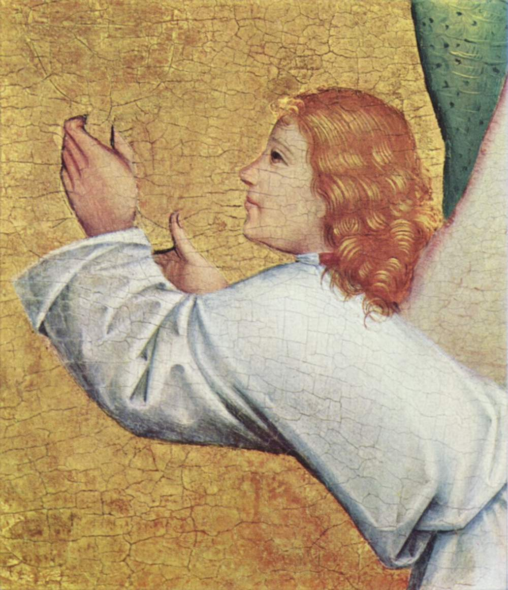 Fragment, Szene: nach links fliegender Engel